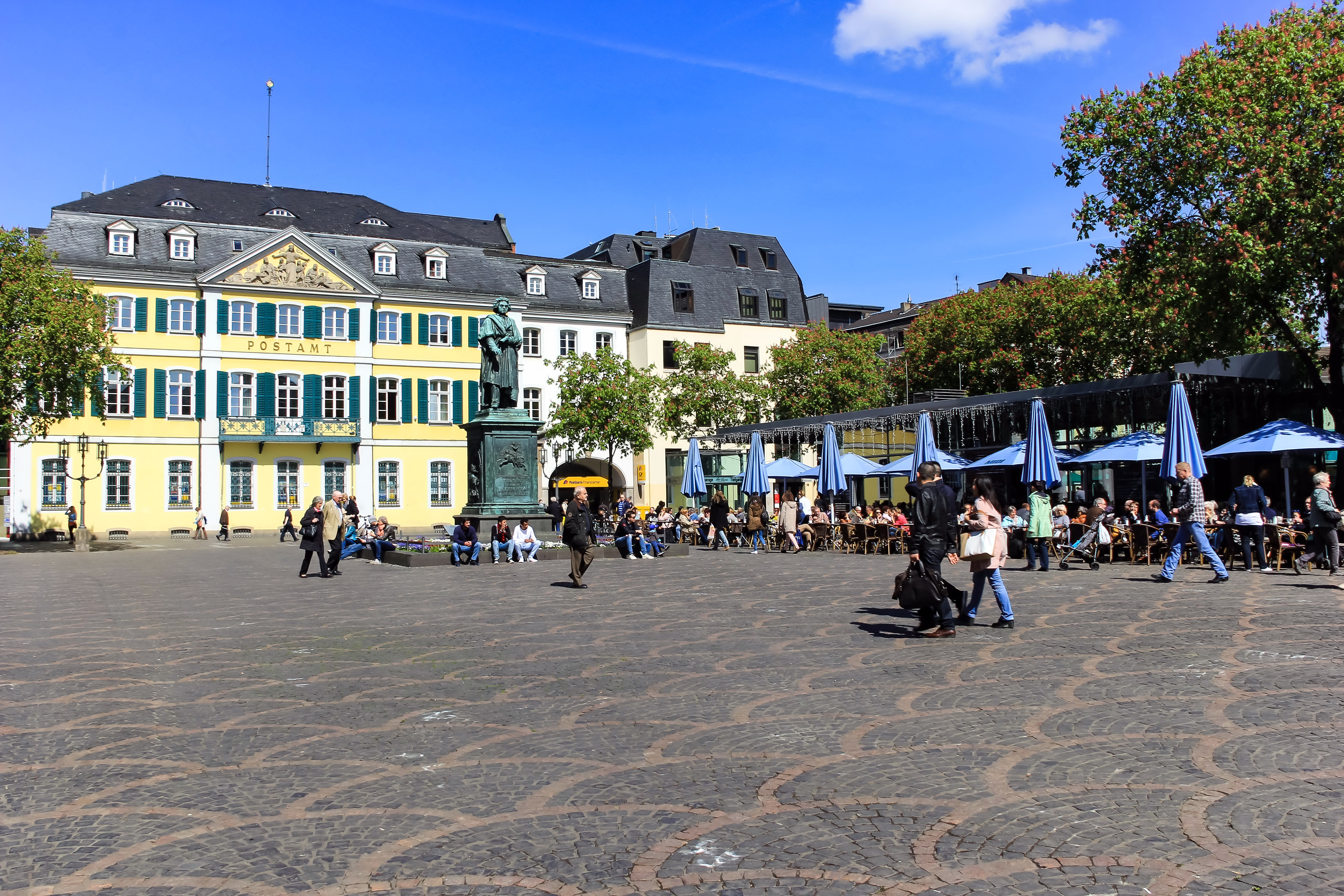 Milchpavillon am Münsterplatz; Das erste hölzerne Milchhäuschen wurde hier um 1900 errichtet. In den 60er Jahren, beim Bau der Tiefgarage unter dem Platz, wurde das Häuschen, das bis zu diesem Zeitpunkt immer aus Holz war, durch einen Neubau ersetzt. Dieser Bau wurde 2006 abgerissen und durch den jetzigen Milchpavillon ersetzt. Das Foto zeigt den neugebauten Pavillon im Jahr 2016.[1]